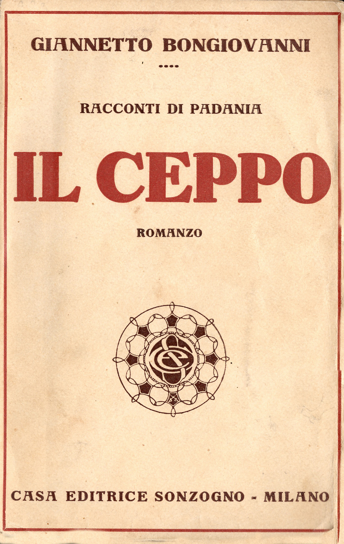 Il primo romanzo